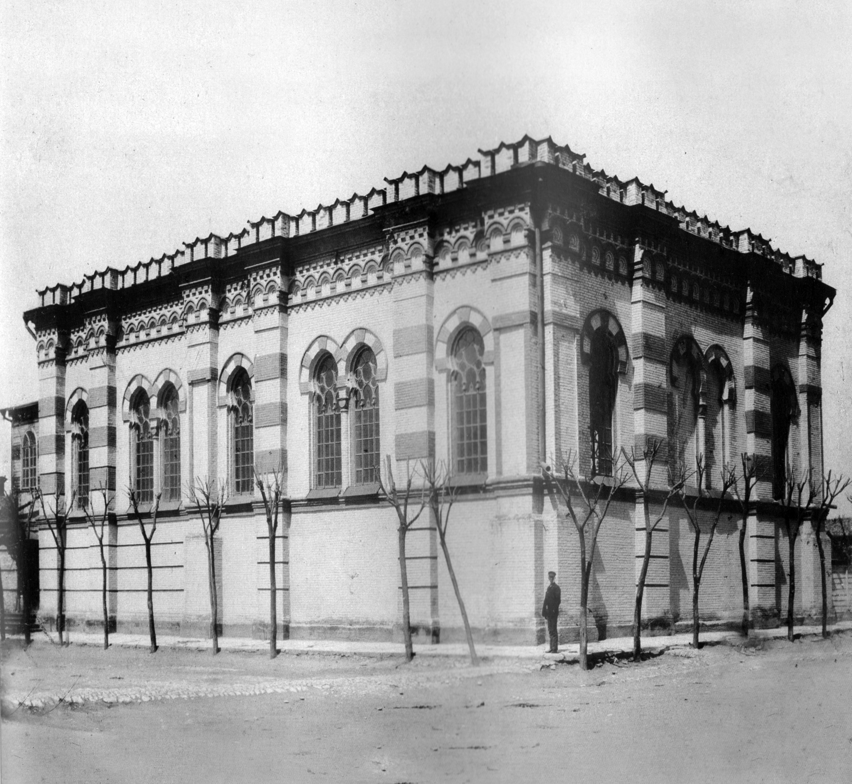 Таганрогская синагога, 1890-е годы. Фрагмент открытки конца XIX века "Таганрогъ - Синагога". А50784